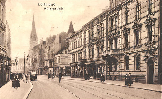 Dortmund Münsterstraße um 1914